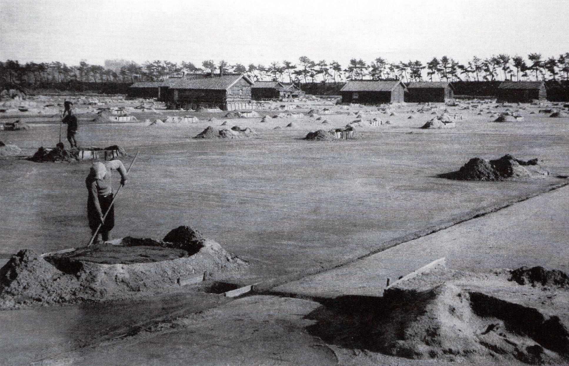 白浜吉田塩田（現在の西尾市吉良町）。1935年頃